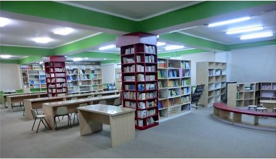 Монгол: Шинэ Монгол сургуулийн сурах орчины талаарх мэдээлэлд хавсралт болгох зорилгоор нийтлэв.